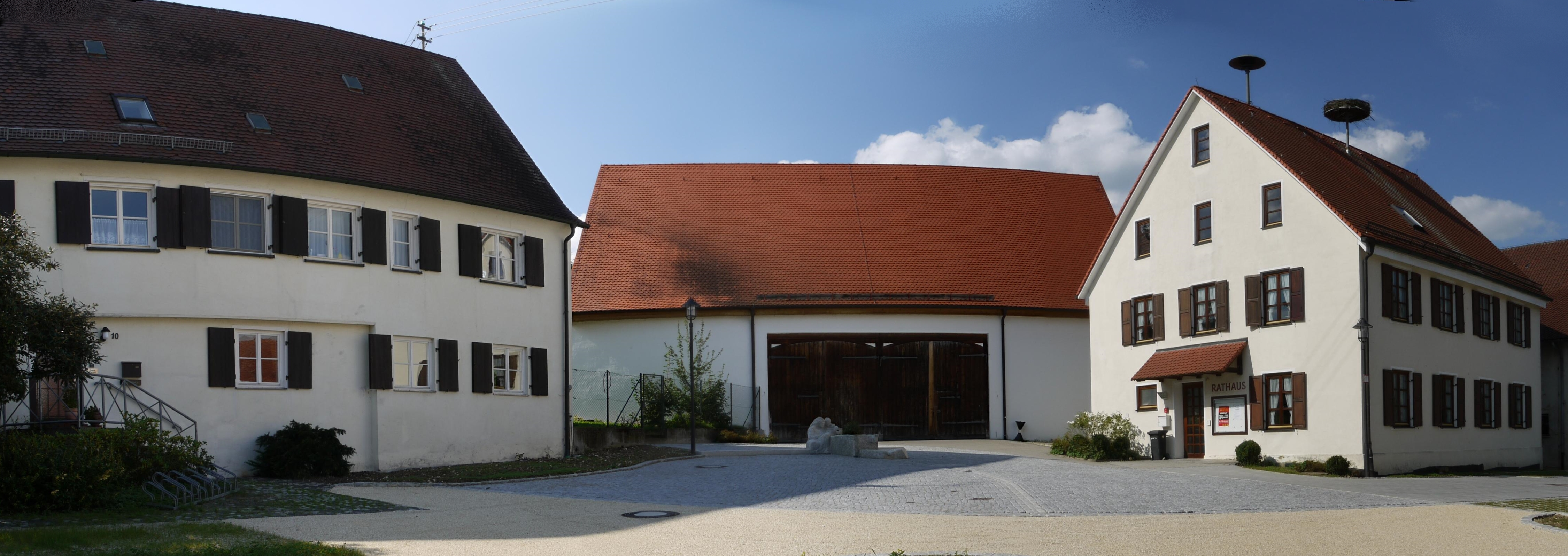 Aufnahme des Pfarrhofes von Göttingen